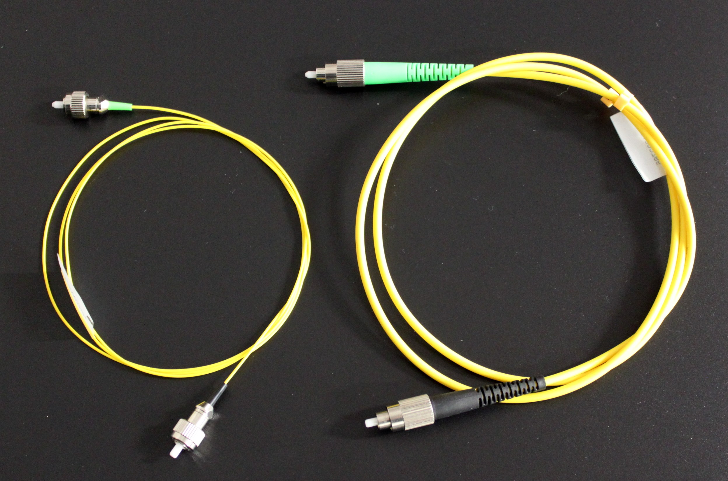 Cordon fibre optique FC-PC / FC-APC diamètre 900 microns et 2 mm